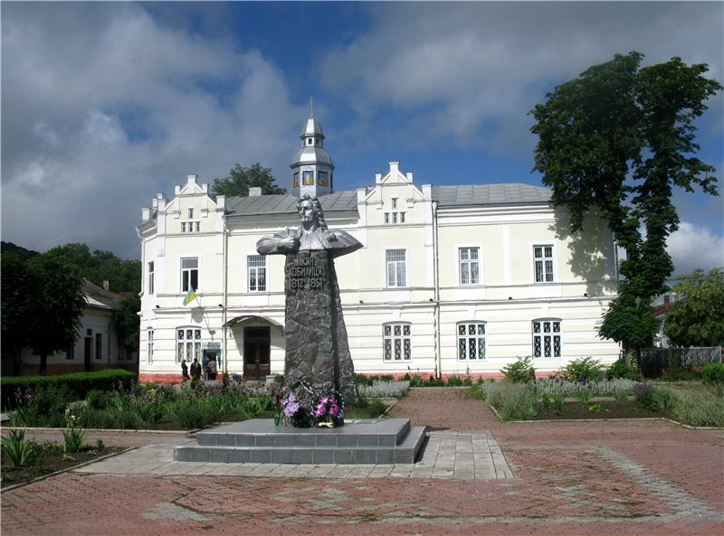 Пам'ятник Лук'яну Кобилиці